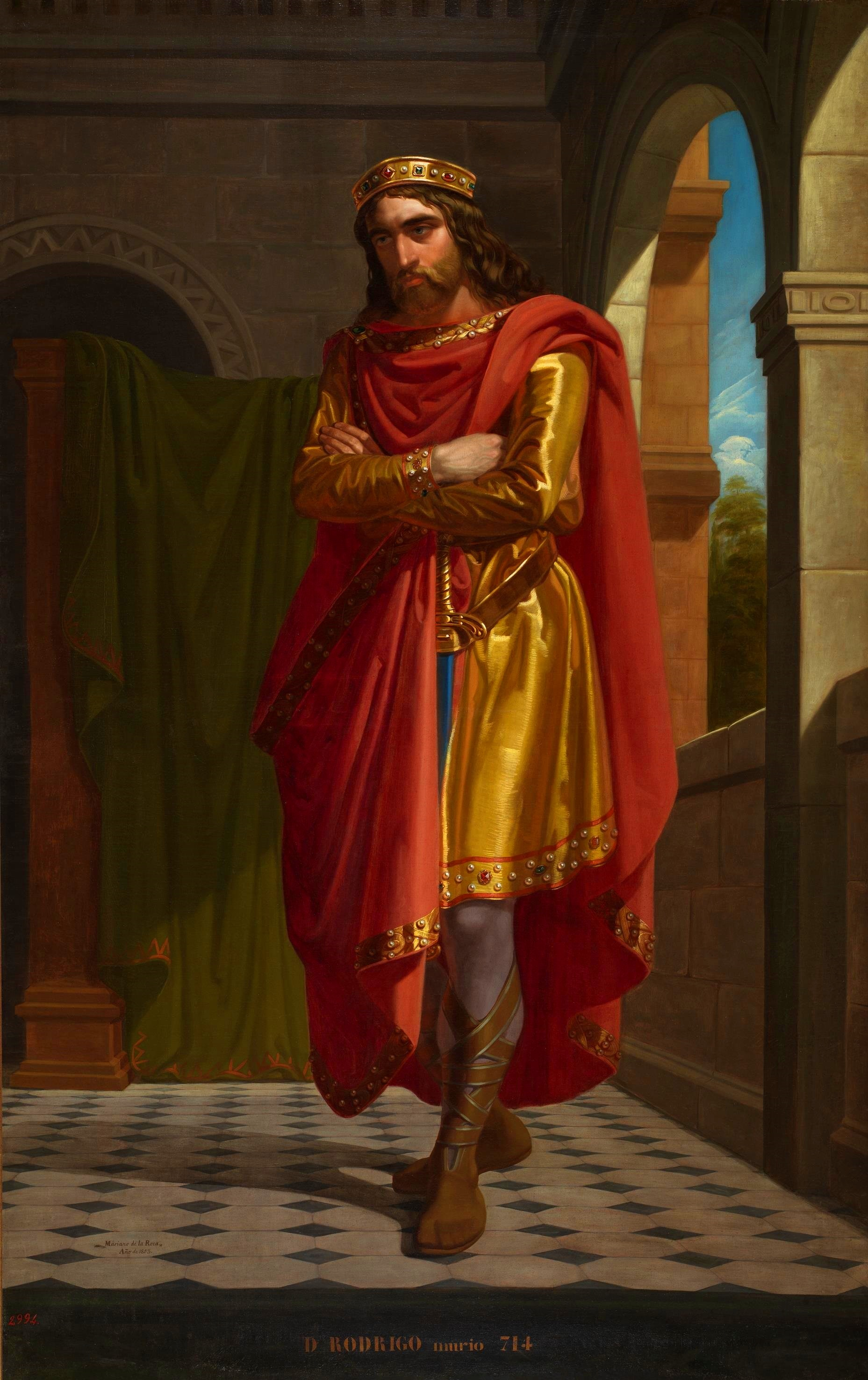 Retrato imaginario de Don Rodrigo († 711), ultimo rey de los visigodos y succesor del rey Witiza. Era hijo de Teodofredo, hijo a su vez del rey Chindasvinto, y murió en la batalla de Guadalete, librada en el año 711, mientras luchaba con el ejército musulmán que había invadido España.